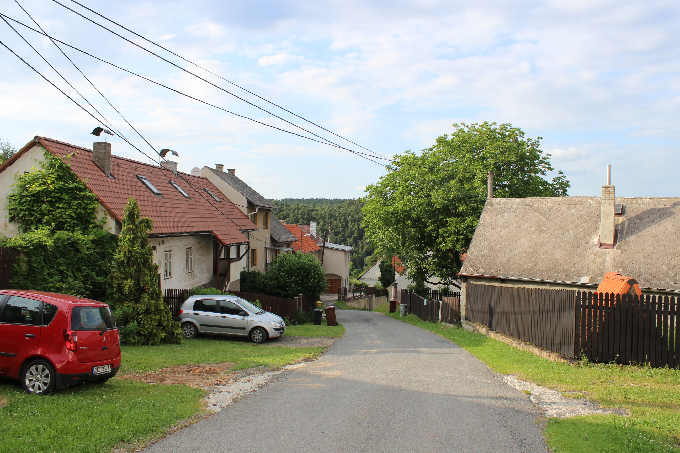 Zastávba v obci Ryšín, části Pavlíkova (pohled od jihu).